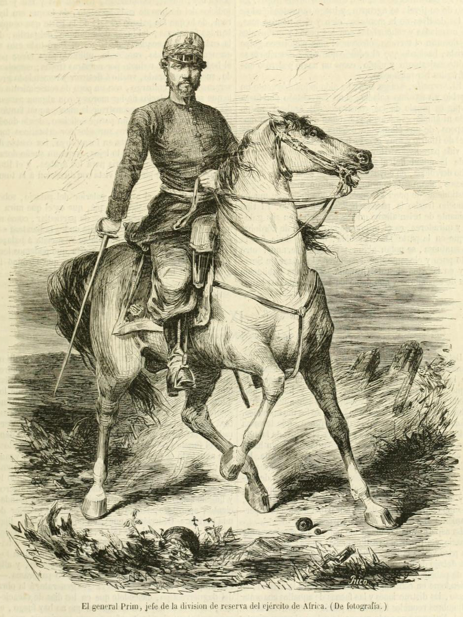 El general Prim, jefe de la división de reserva del ejército de África.